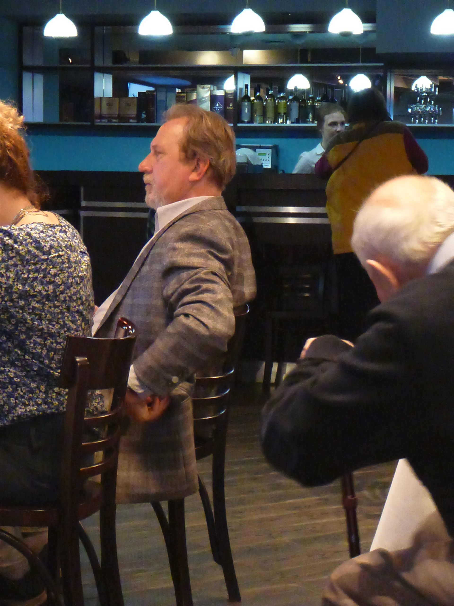 Александр Кондрашов в жюри фестиваля Россия Екатеринбург 2019 год